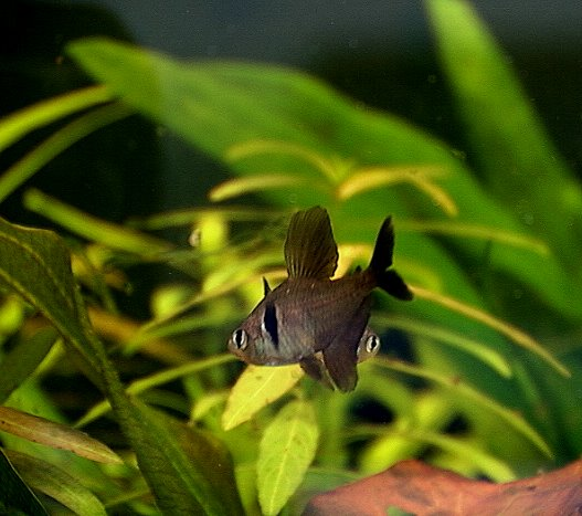 Tetra fantome